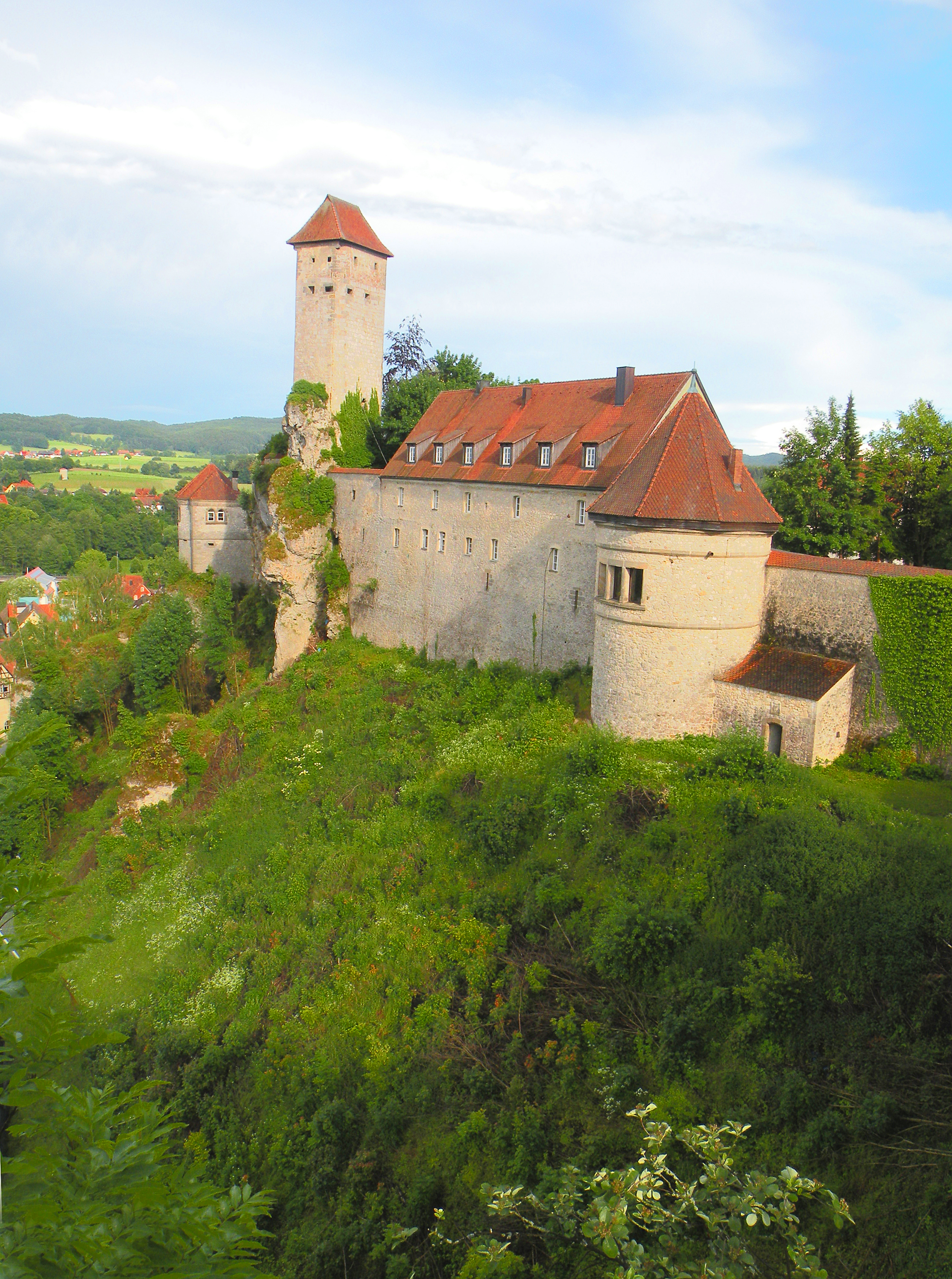 Франконская Швейцария. Замок Фельденштайн